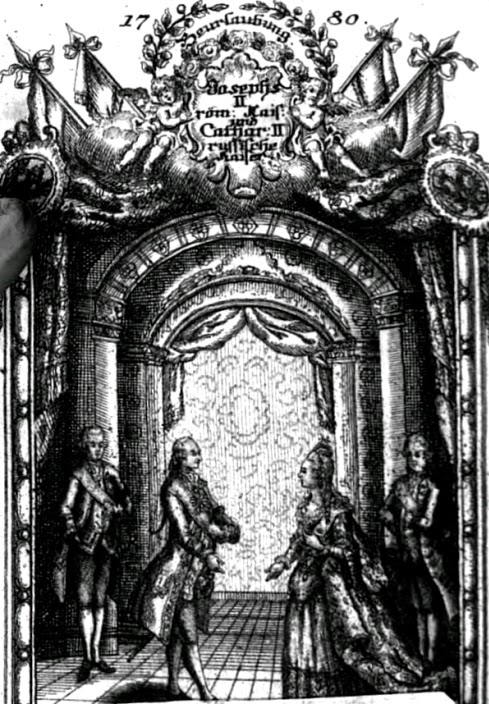 Abschied Josephs II. von Katharina II., Peterhof, 19. Juli 1780. Frontispiz von Johann Georg Mayer: "Der erhabene Adler in der Maske des Falken, oder Kaiser Josephs II. Reise nach Russland unter dem Namen eines Grafen von Falkenstein" (…) Augsburg (1780).